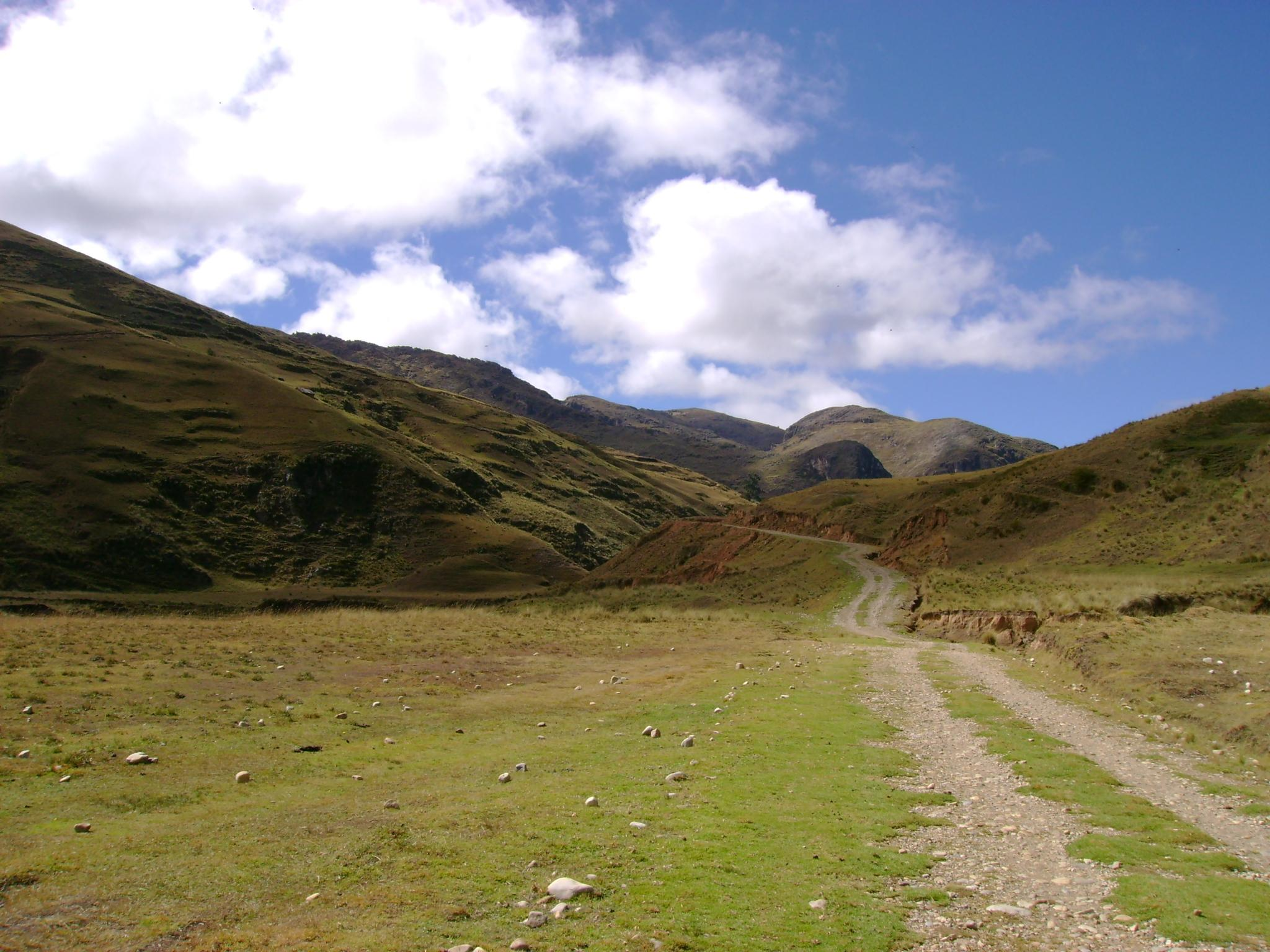 Localidad de Progreso